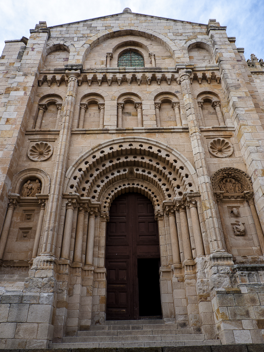 06082013 185038 ZAMORA 0399